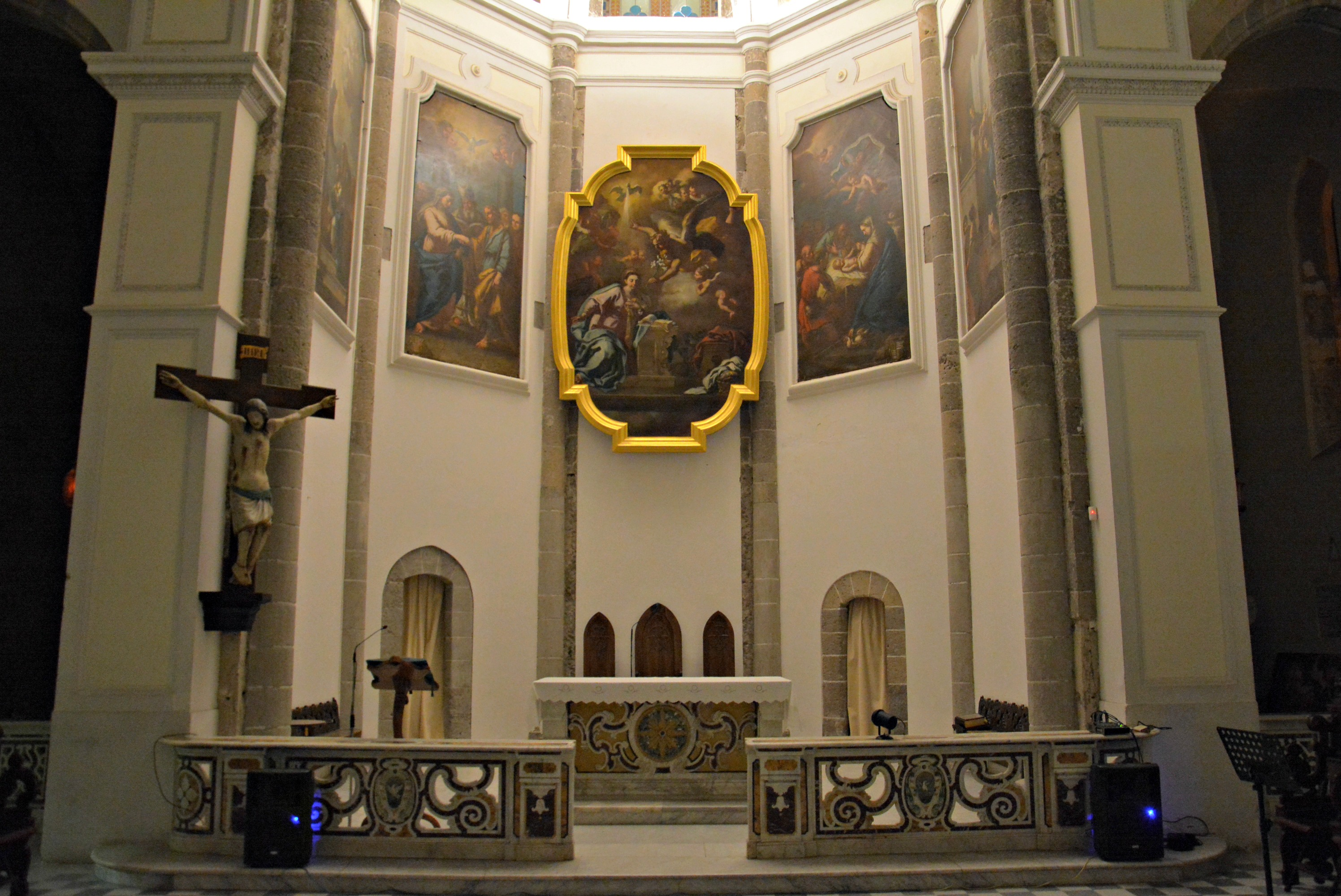 Vedi titolo